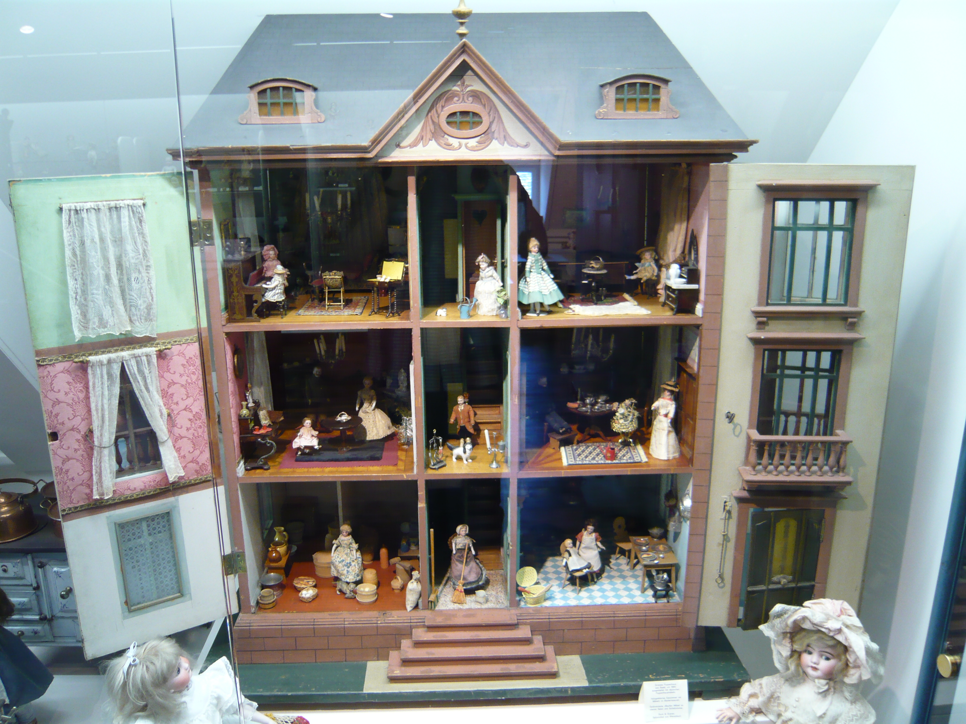 aufgenommen im Zürcher SpielzeugmuseumNative nameZürcher SpielzeugmuseumLocationZürich, SwitzerlandCoordinates47° 22′ 23.15″ N, 8° 32′ 23.22″ EEstablished1956WebsiteZürcher Spielzeugmuseum